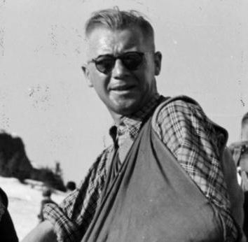 Title: Skeikampen, Daluege, Terboven Extra information: Norwegen, Skeikampen.- General Kurt Daluege und Reichskommissar Josef Terboven (mit linkem Arm in Schlinge) People in the image: Daluege, Kurt Max Franz: Polizeigeneral, SS-Gruppenführer, 1946 in Prag hingerichtet, Deutschland * Terboven, Josef: Gauleiter von Essen, Reichskommissar für Norwegen, Deutschland Factual corrections and alternative descriptions are encouraged separately from the original description. Additionally errors can be reported at this page to inform the Bundesarchiv. Original historic description: Skeikampen April 42 General Daluege und Gauleiter Reichskommissar Terboven